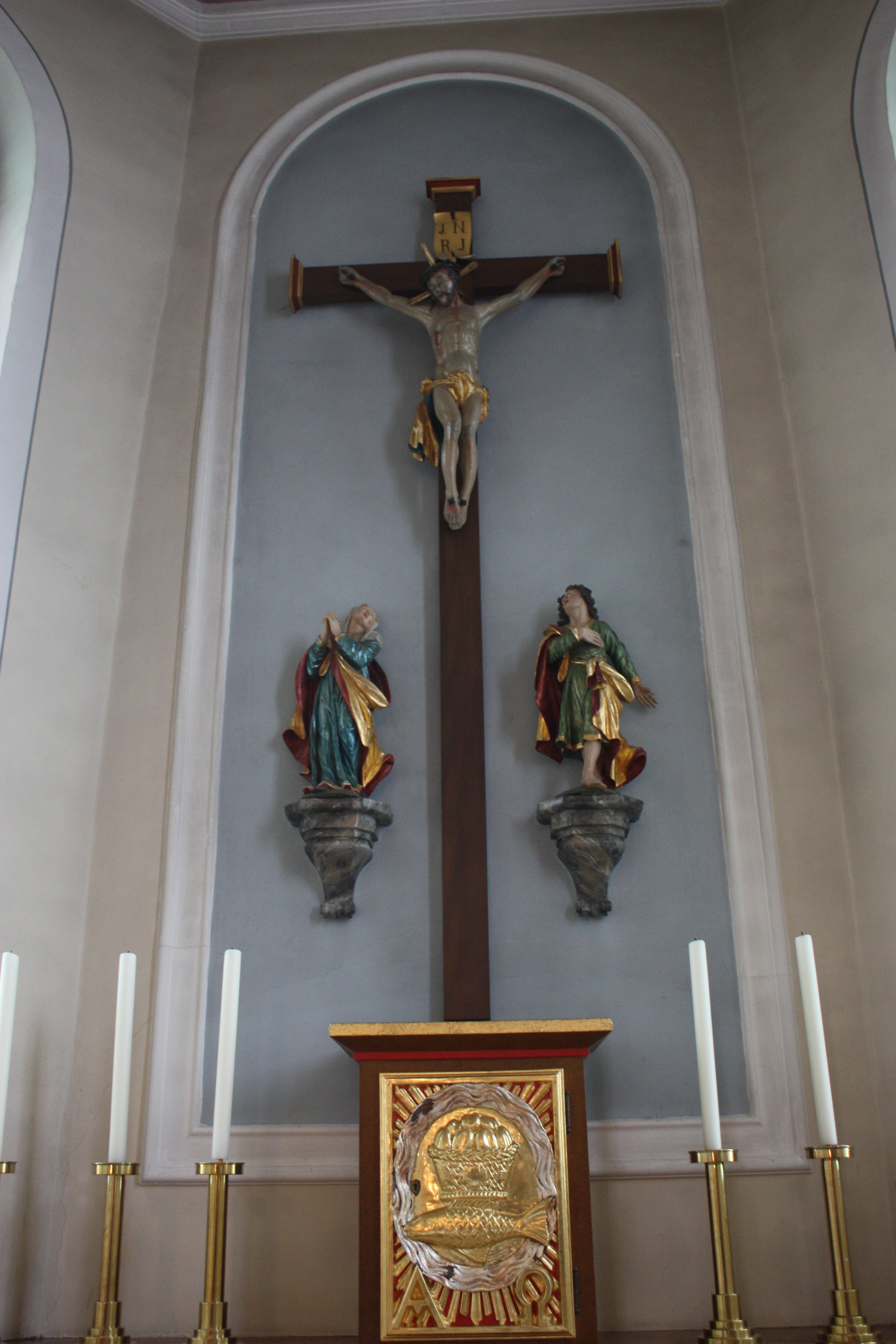 Kreuzigungsgruppe in St. Martin in Kadelburg, Ortsteil von Küssaburg aus dem ehemaligen Kapuzinerkloster Waldshut